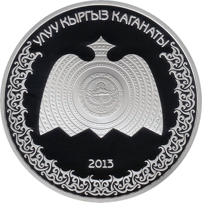 Памятная монета Кыргызстана "Великий Кыргызский каганат" - 10 сомов 2013 - серебро-925 Кыргызча: Улуу Кыргыз каганаты